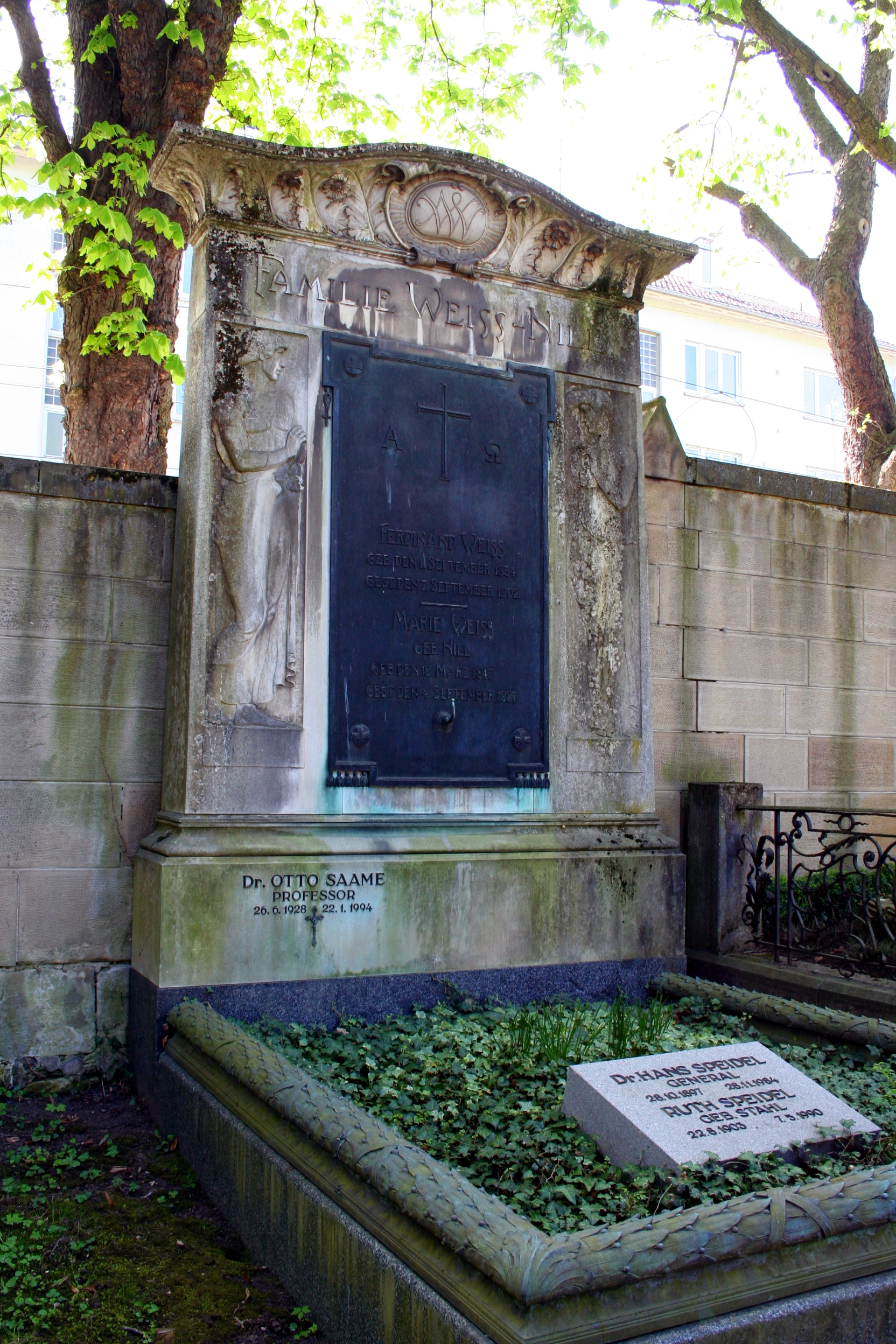 Grab des Generals Hans Speidel auf dem Pragfriedhof in Stuttgart